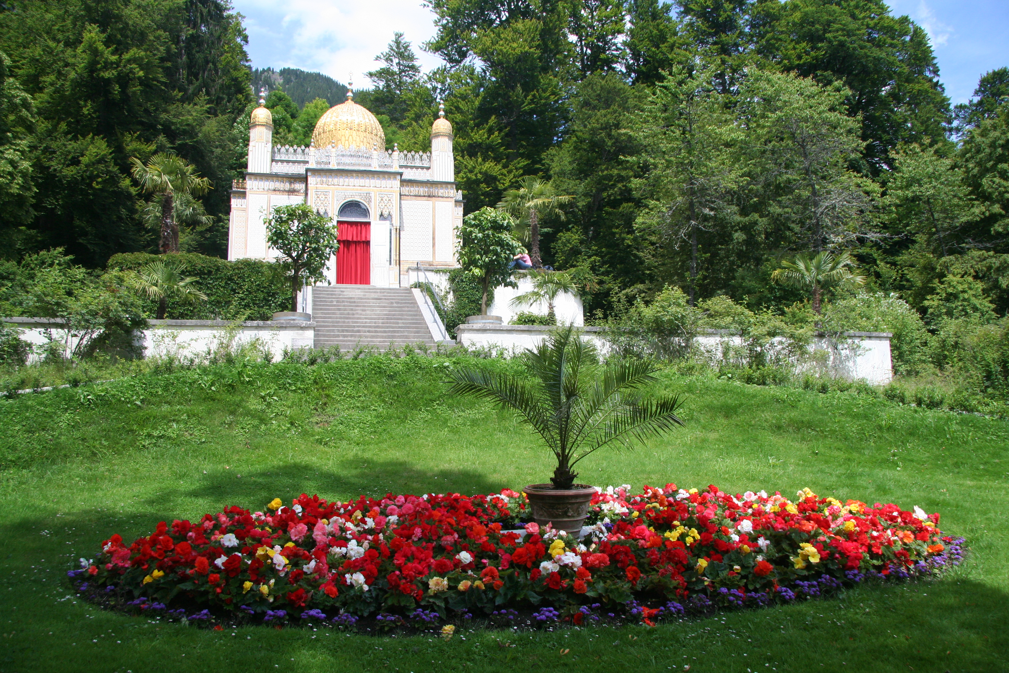 Maurischer Kiosk von Außen (Frontansicht)